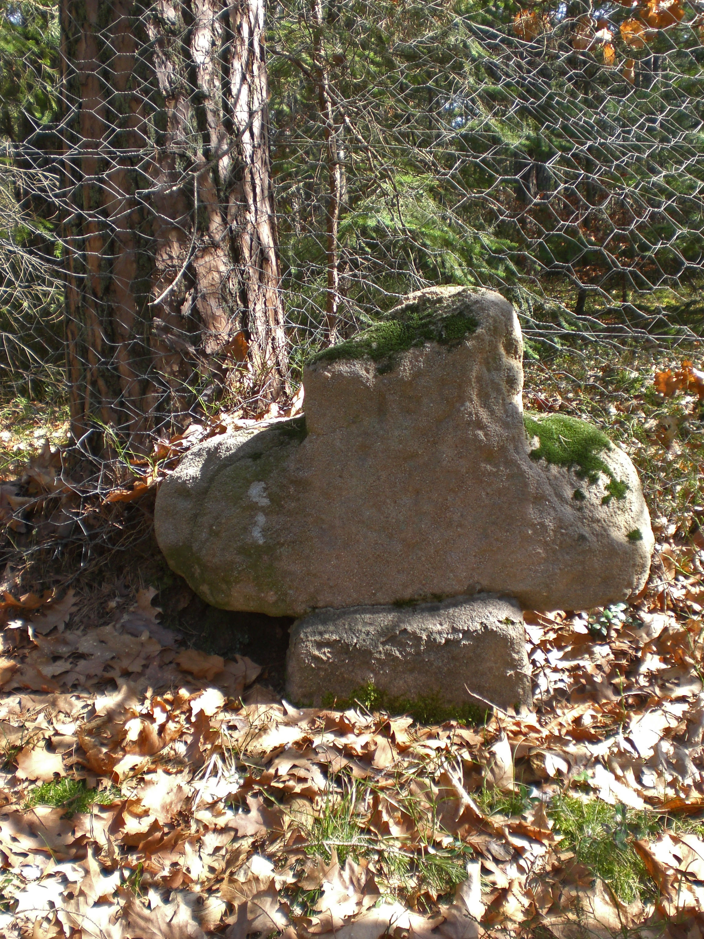 Sühnekreuz, Sperberslohe